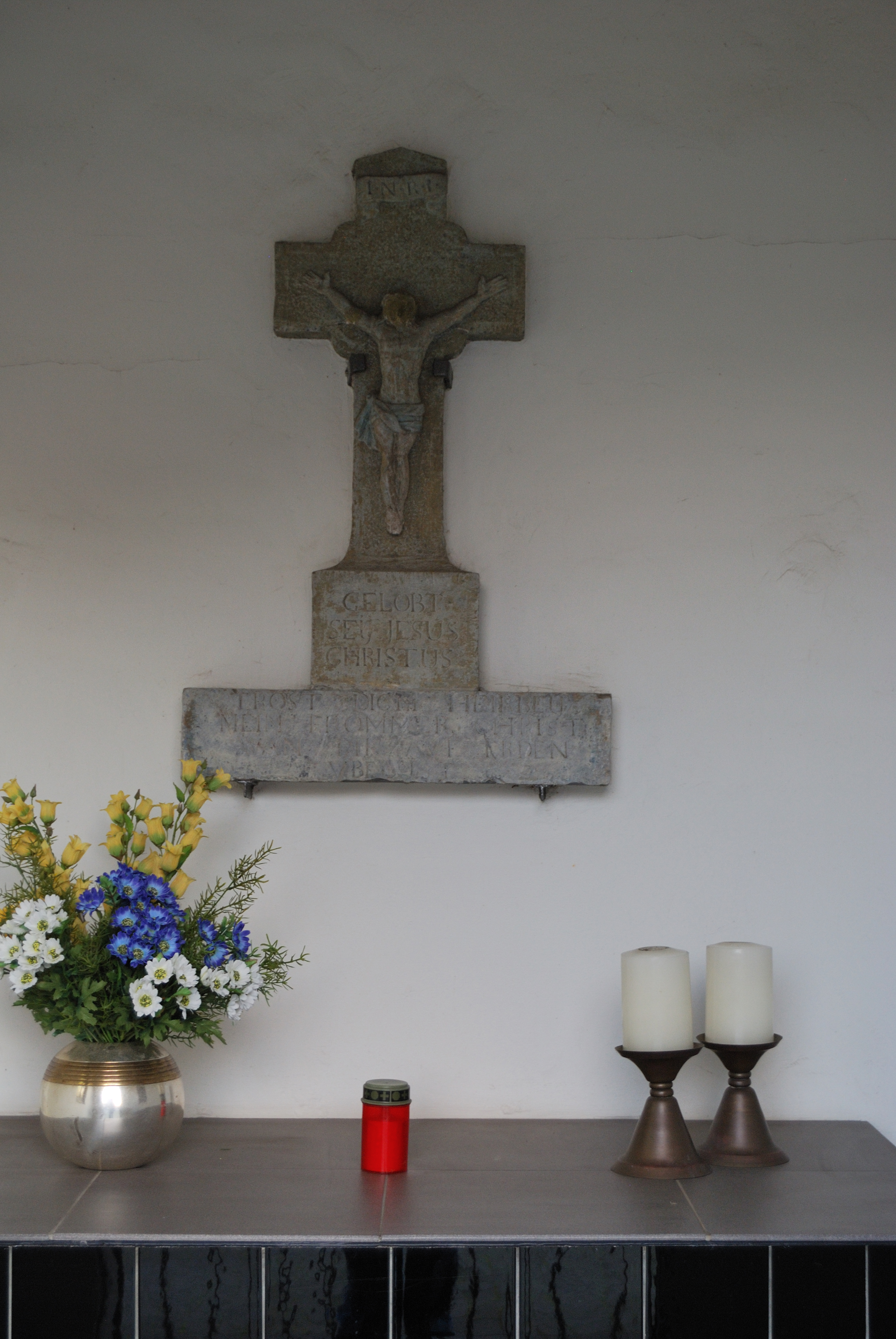 Alpenstraße/Ecke FortunastraßeThis is a photograph of an architectural monument.